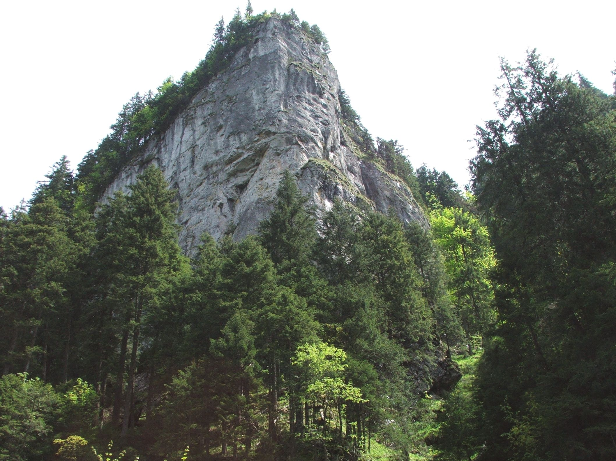 Wapienne turnie w Dolinie Kościeliskiej